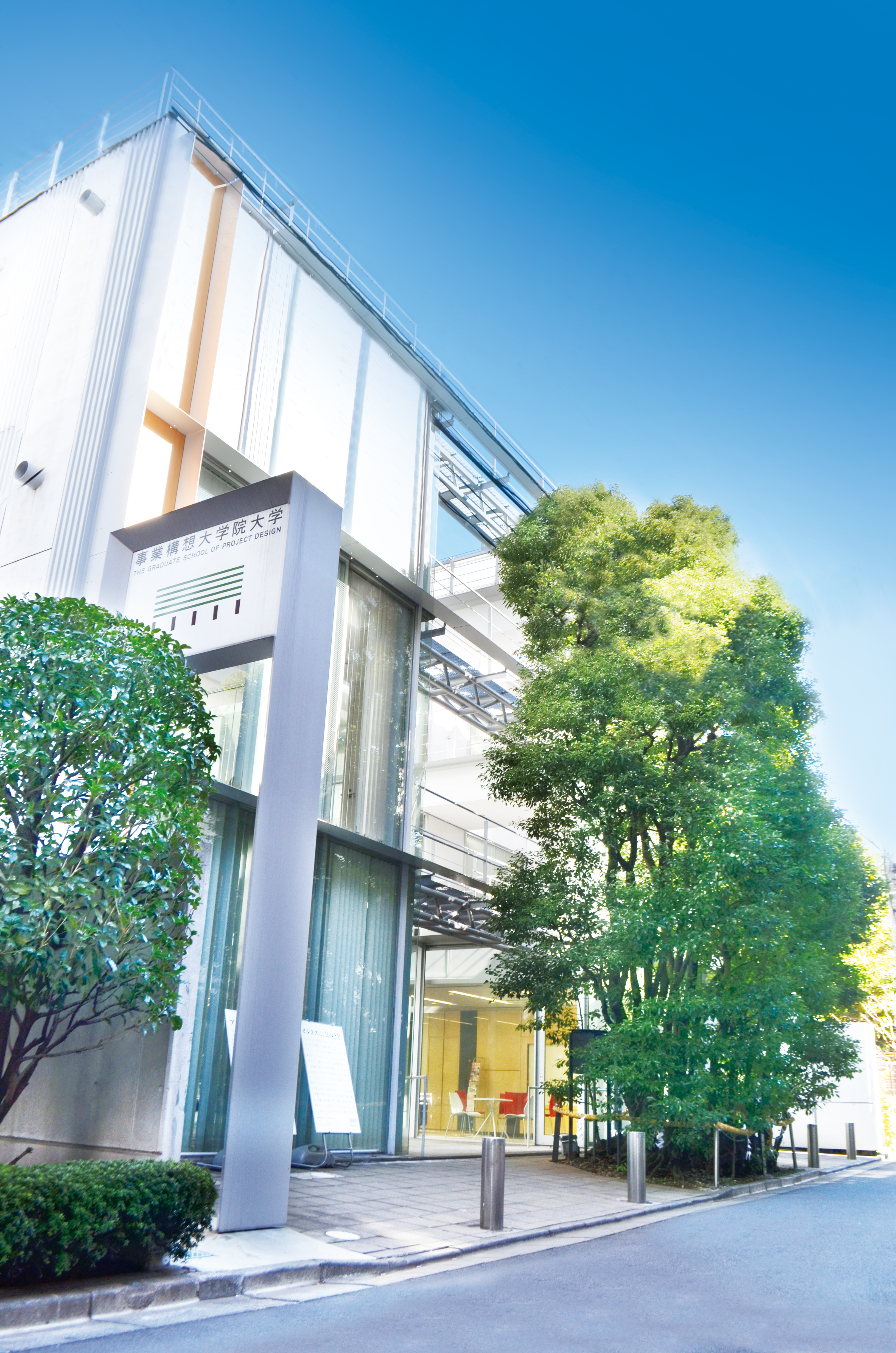 事業を生みだし、未来を創る、MPD修士課程（東京・表参道）